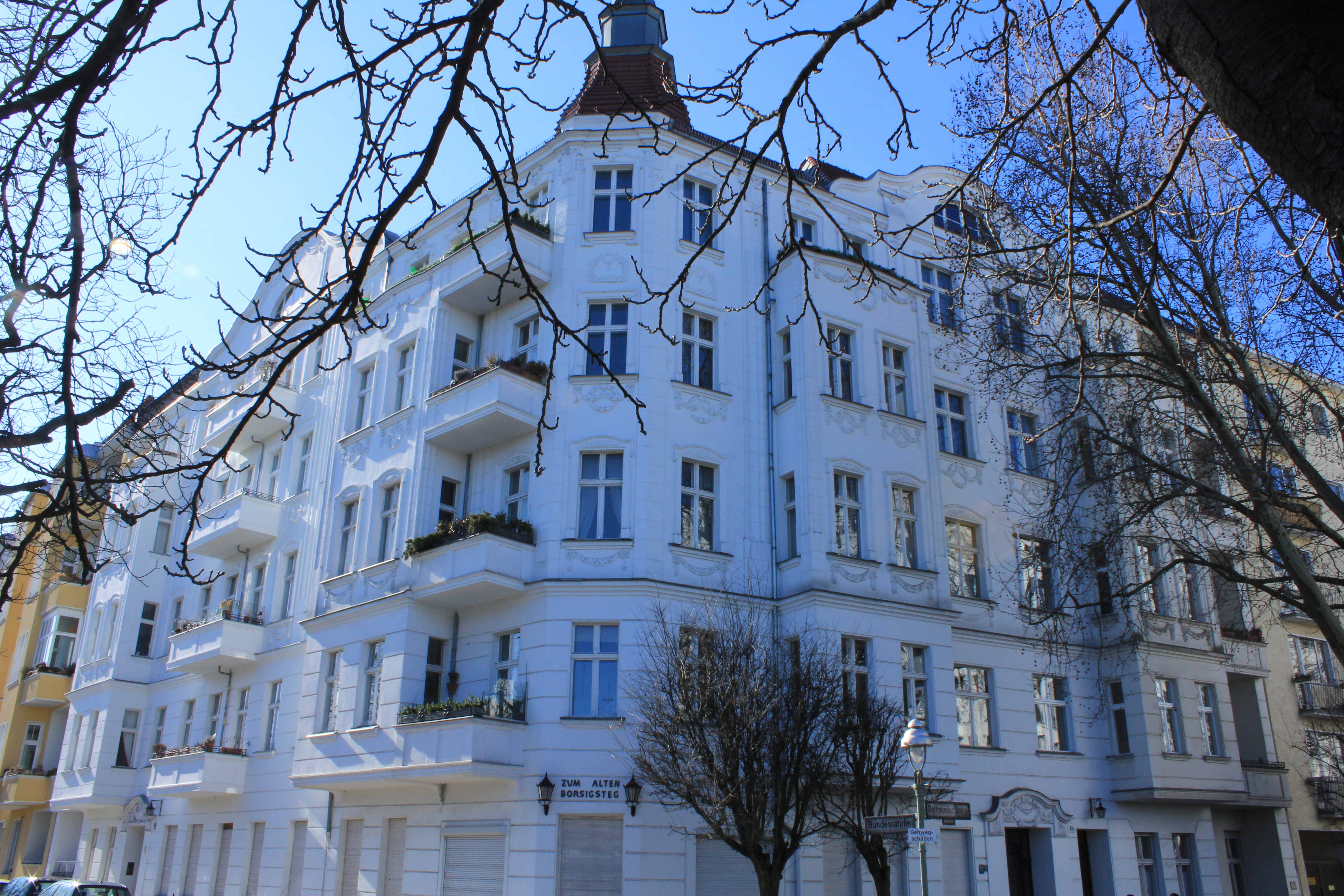 Mietshaus 1906-1907 von Paul Schöne Dortmunder Straße 15